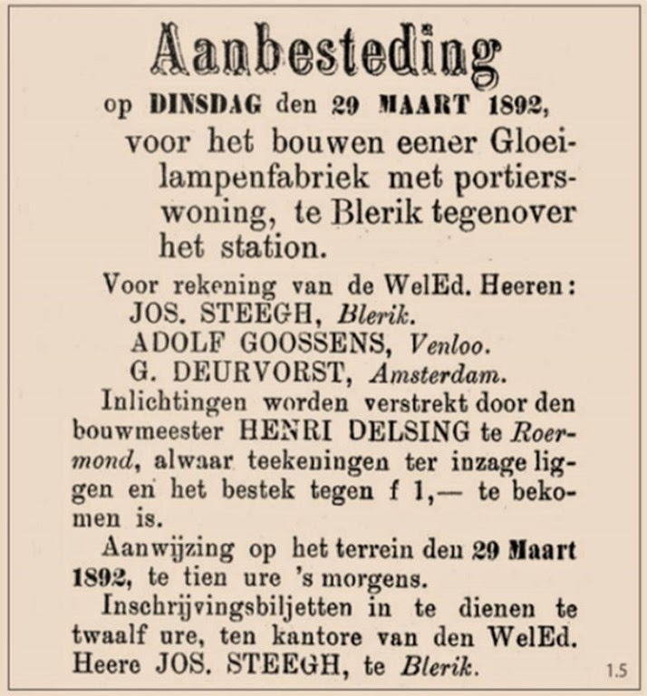 Advertentie aanbesteding gloeilampenfabriek met portierswoning Blerick. In de Venloosche Courant, 19 en 26 maart 1892.